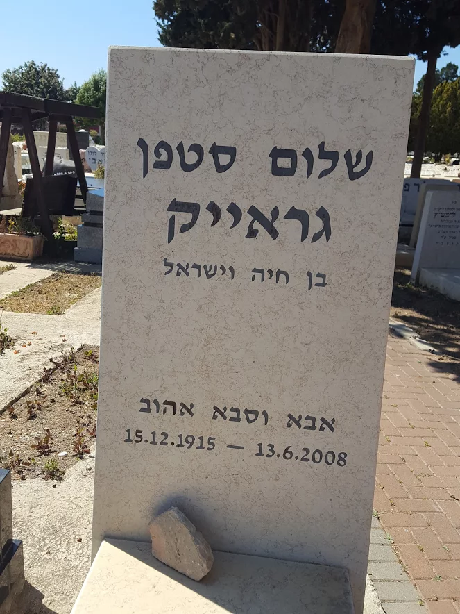 קברו של שלום סטפן גראייק מלוחמי גיטו ורשה בבית העלמין בהרצליה צילום אלי אלון